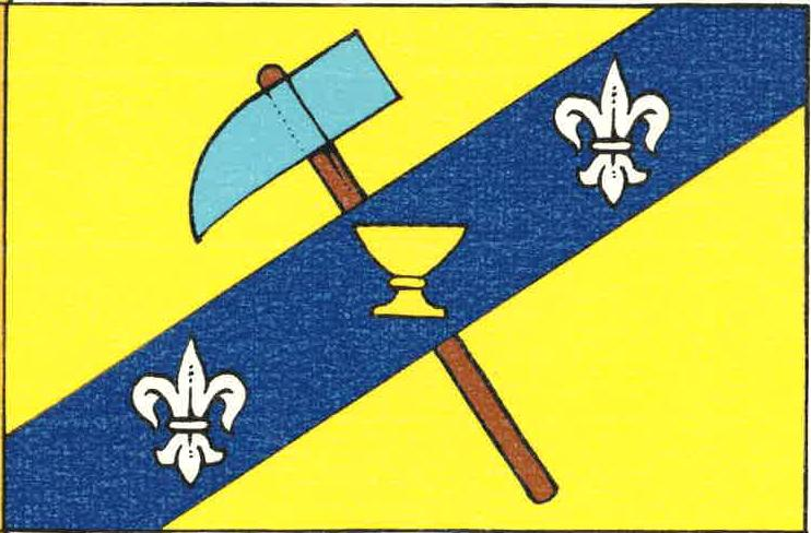 Vlajka, Nové Dvory, okres Příbram